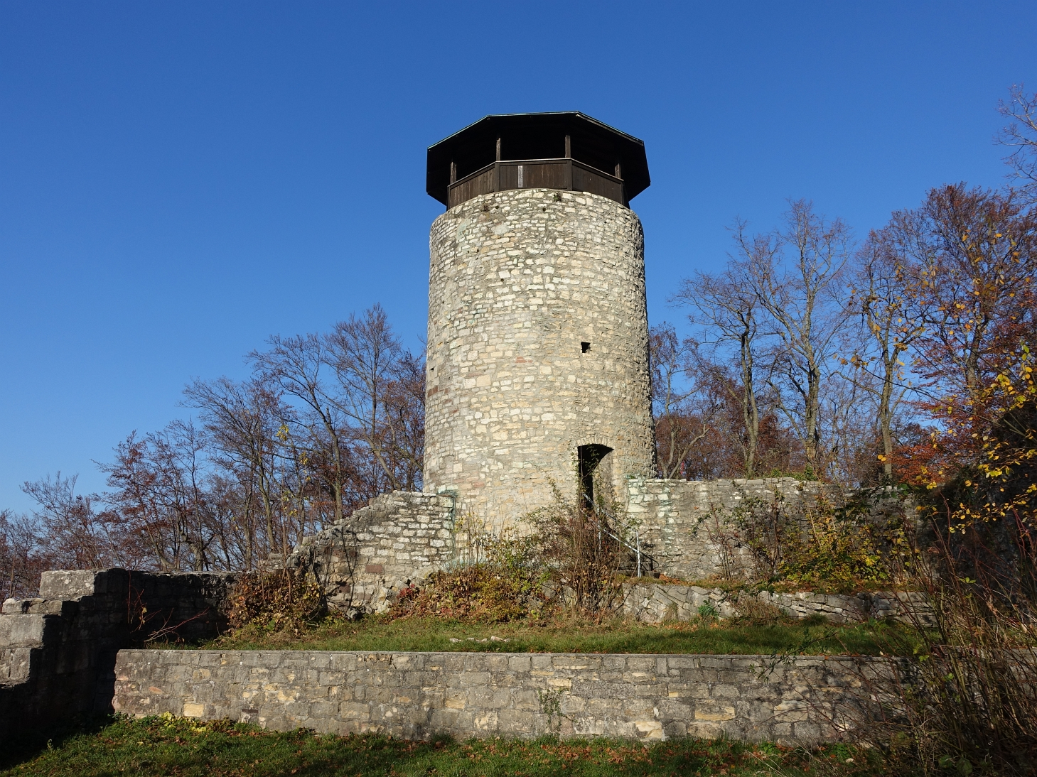 Hintere Burgruine Wartenberg, Muttenz